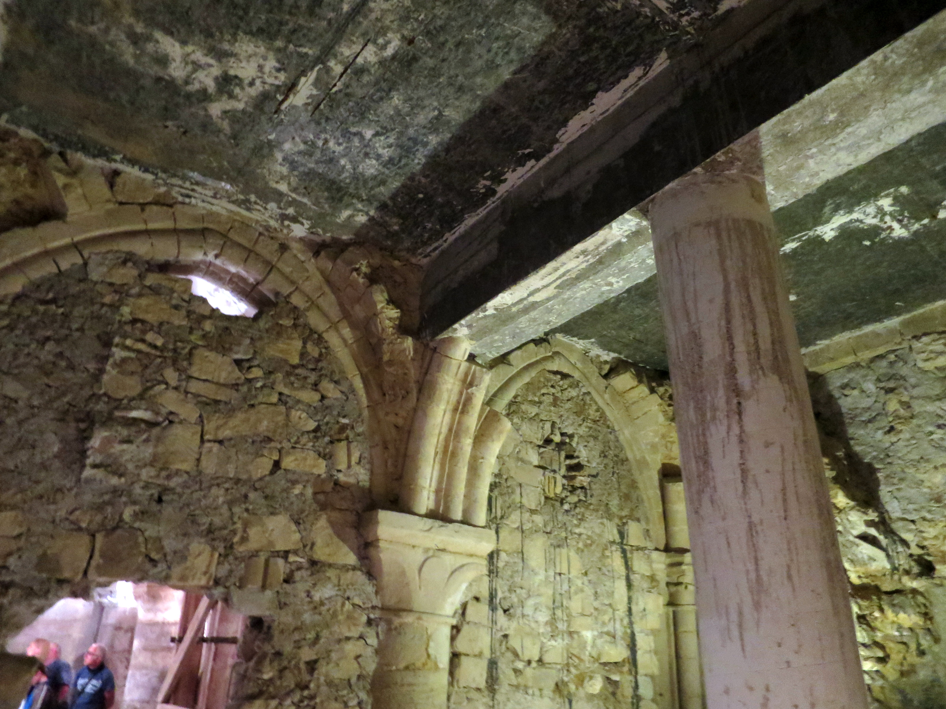 crypte de l'église Saint-Martin à Cormeilles-en-Parisis.